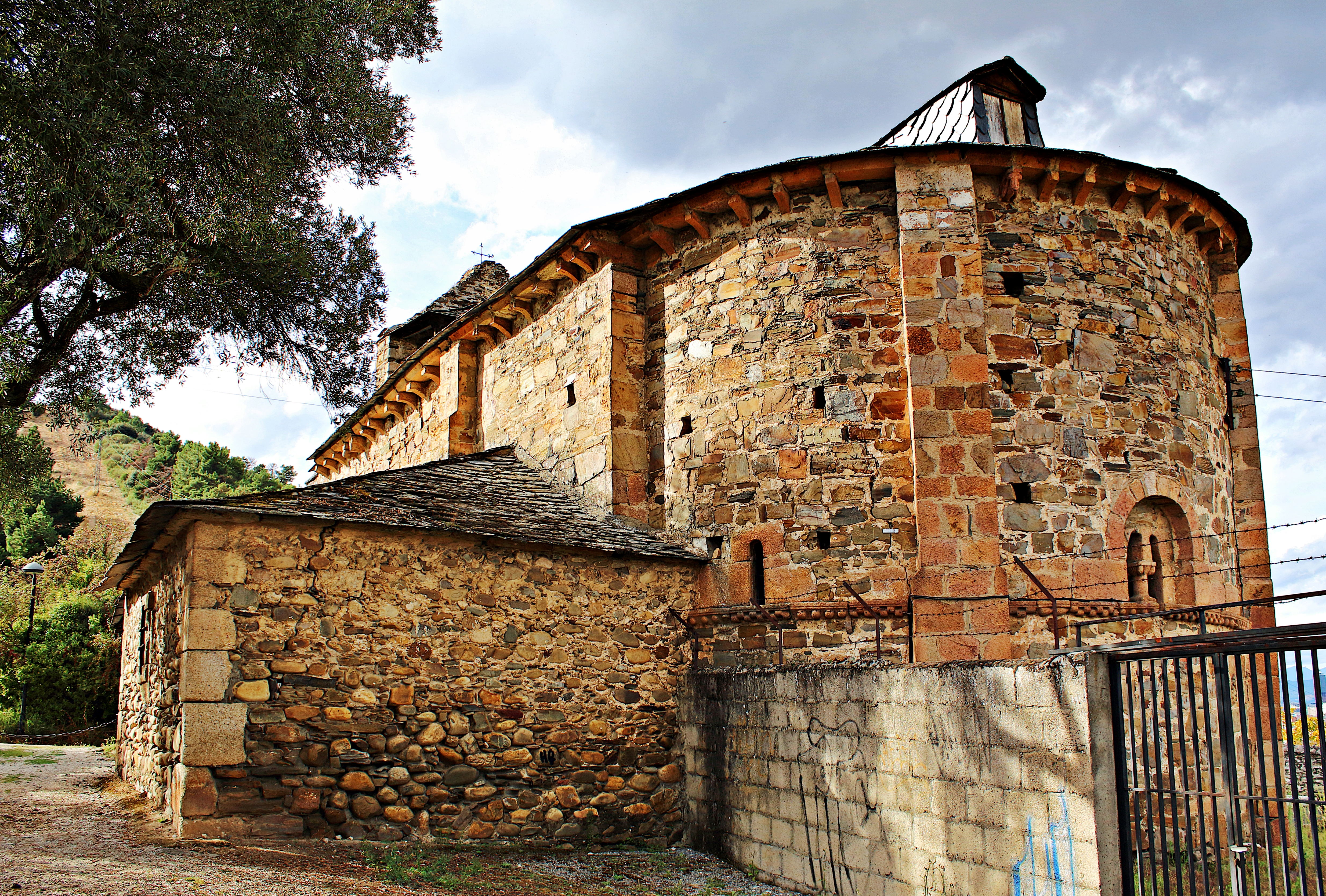 Localidad de Otero, Ayuntamiento de Ponferrada, comarca de El Bierzo, provincia de León.